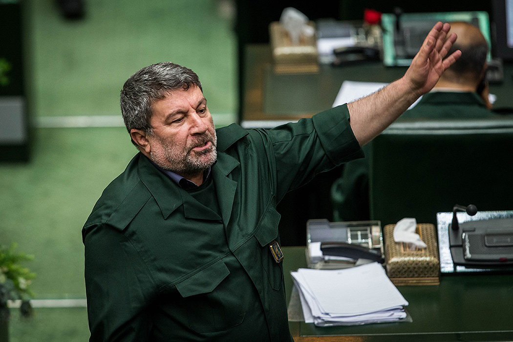 حضور نمایندگان مجلس شورای اسلامی ایران با یونیفرم سپاه پاسداران انقلاب اسلامی در جلسهٔ علنی ۲۰ فروردین ۱۳۹۸، به مناسبت روز پاسدار و در محکومیت اقدام دولت ایالات متحدهٔ آمریکا در قرار دادن سپاه پاسداران در فهرست گروه‌های تروریستی